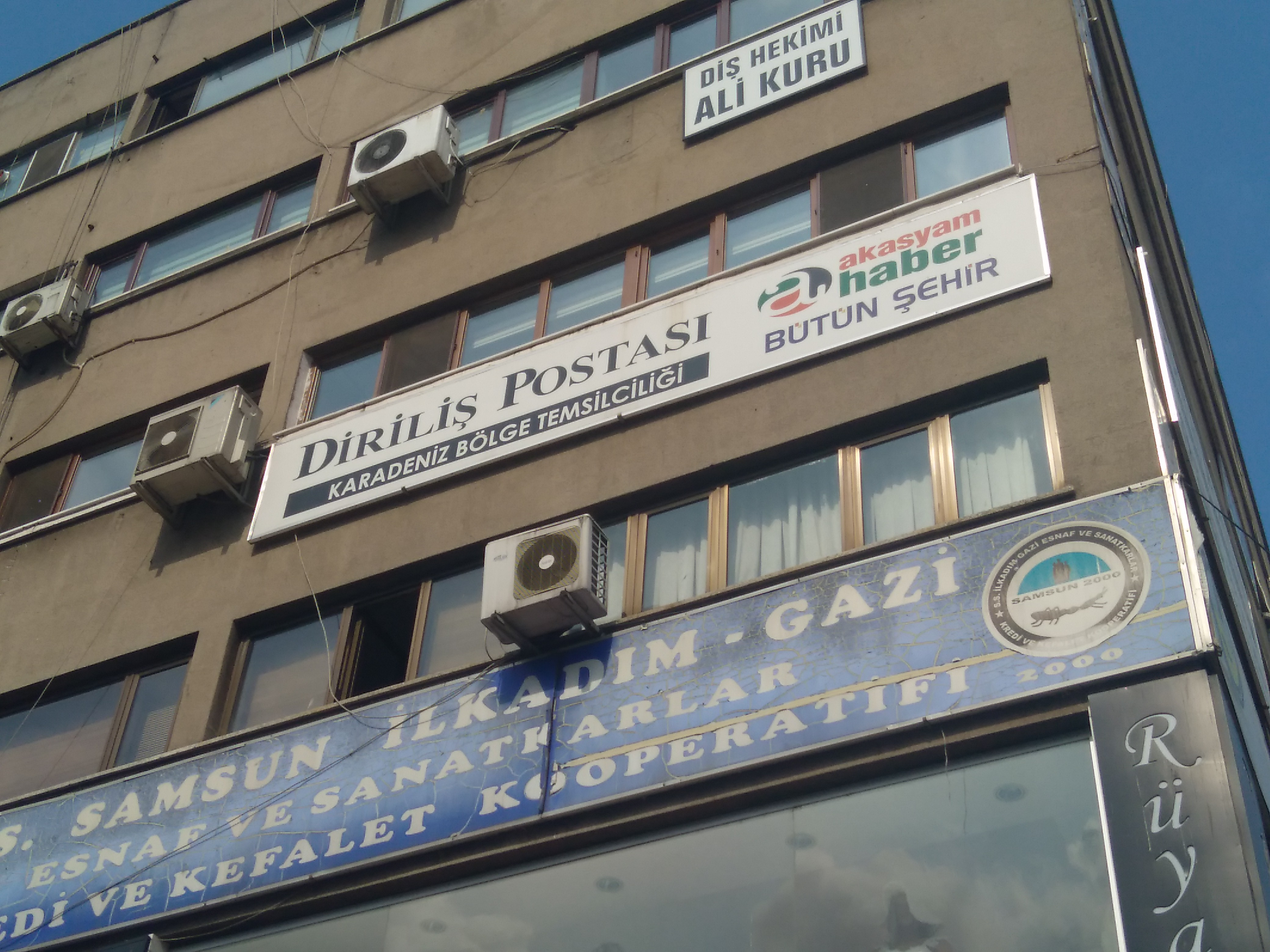 Samsun'un Subaşı mevkiinde Diriliş Postası Karadeniz Bölge Temsilciliği ve akasyamhaber tabelaları.